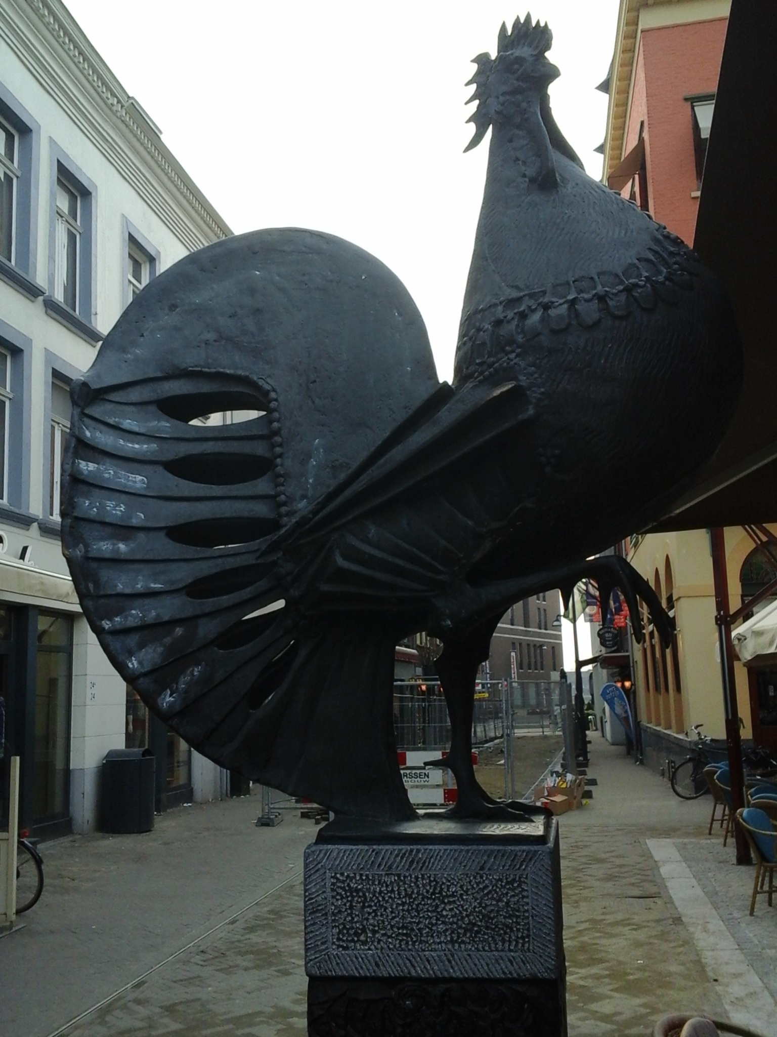 Sculptuur Jocushaan Venlo